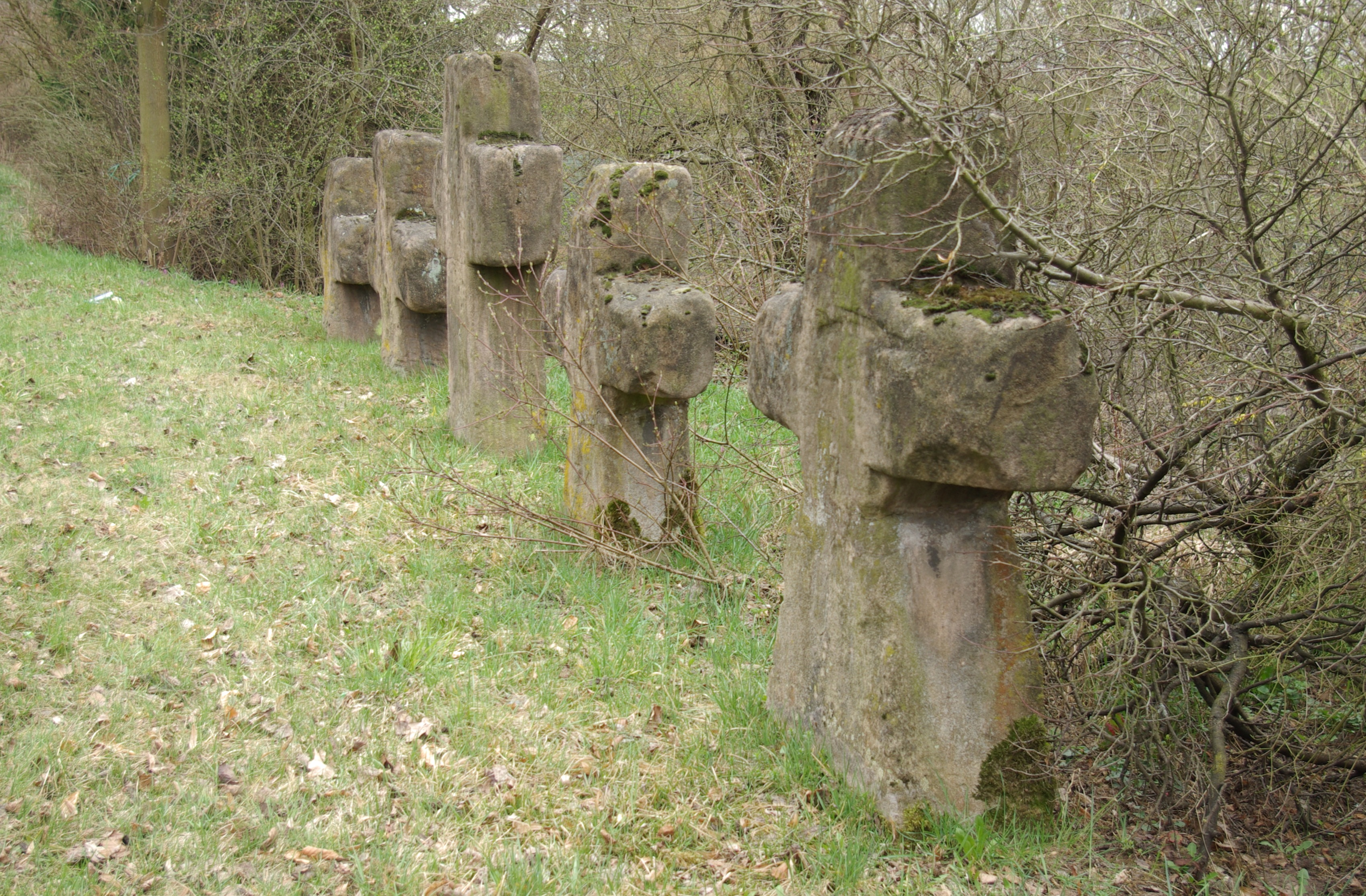 Die fünf mittelalterlichen Steinkreuze am südlichen Ortseingang des Erlanger Stadtteils Bruck. Das erste Kreuz ist ohne Zeichen, beim zweiten ist am Fuß ein Weberschiffchen eingemeißelt, am dritten Kreuz befinden sich Wetzrillen sowie am rechten Arm die Buchstaben PK. Das vierte Kreuz hat Armstützen und einige kleine Löcher. Das letzte Kreuz hat ebenfalls Armstützen und am Kopf ein kleines eingeritztes Kreuz. Sie werden die Schweden- oder Keltschensteine genannt. Sie sollen aus der Fehde des Fuhrmanns Kunz Keltsch stammen. Der Sage nach sollen hier fünf Knechte des Keltsch, die im Kampf mit Nürnberger Söldnern gefallen sein sollen, begraben liegen. Auch soll ein Richtschwert unter einem der Steine liegen. Ursprünglich standen die Steine in der Flur, seither wurden sie mehrmals umgesetzt.